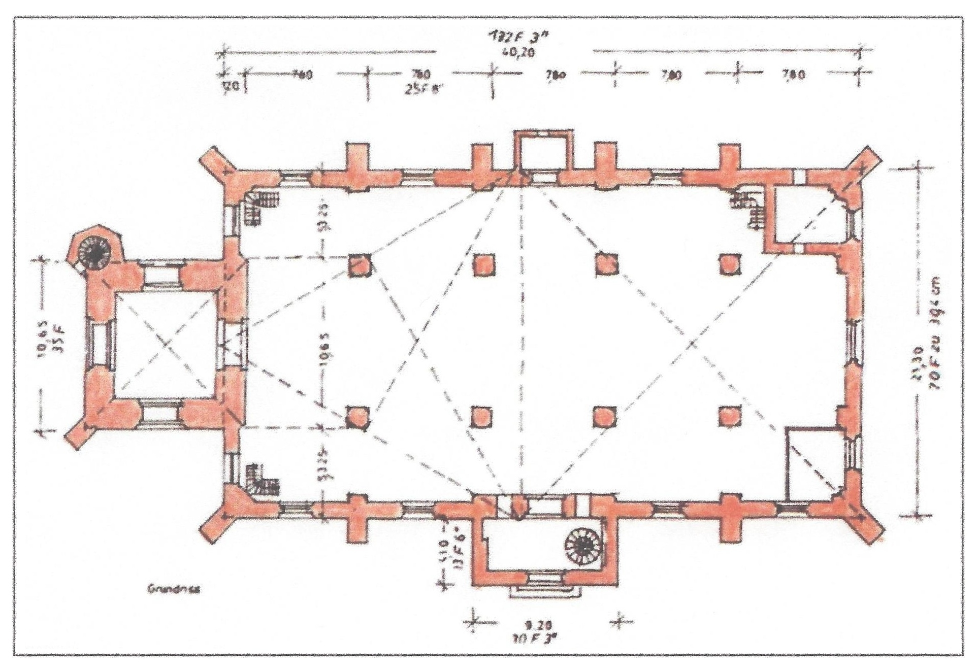 Grundriss der Deutschen Kirche in Tilsit